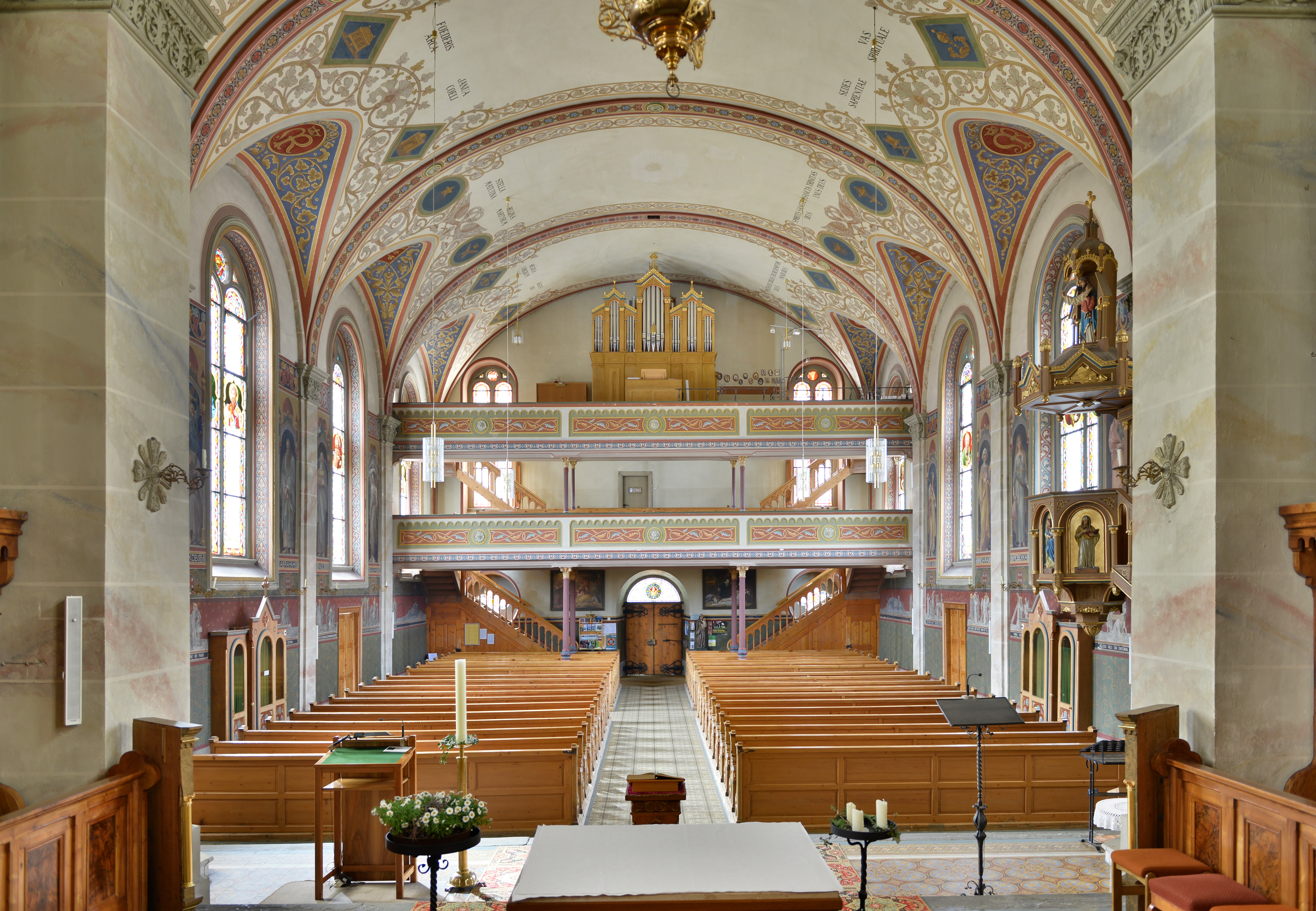 Römisch-katholische Pfarrkirche Maria Opferung (Riezlern)